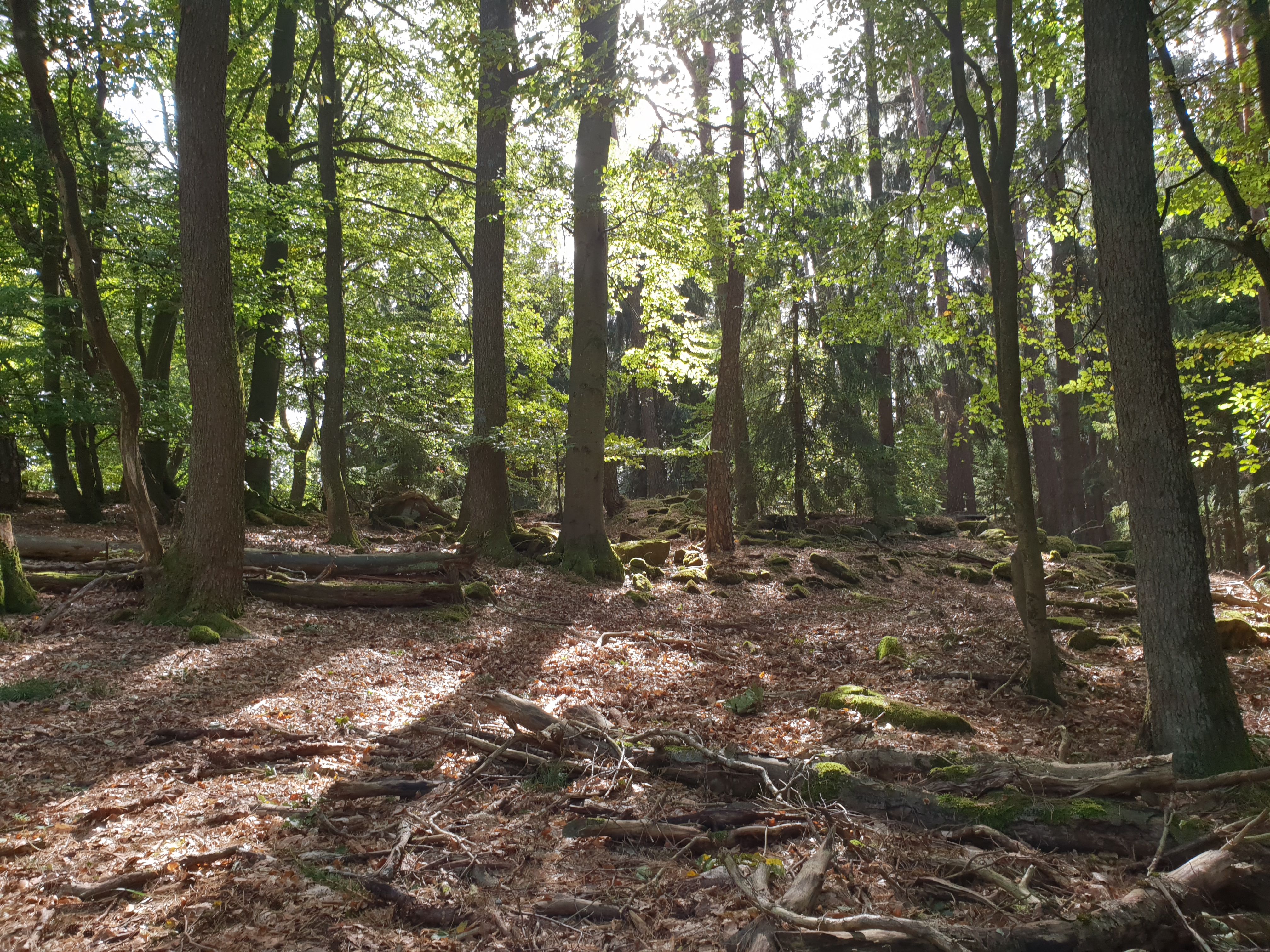 Oberscheidplatz (Pfälzerwald) - Gipfelregion